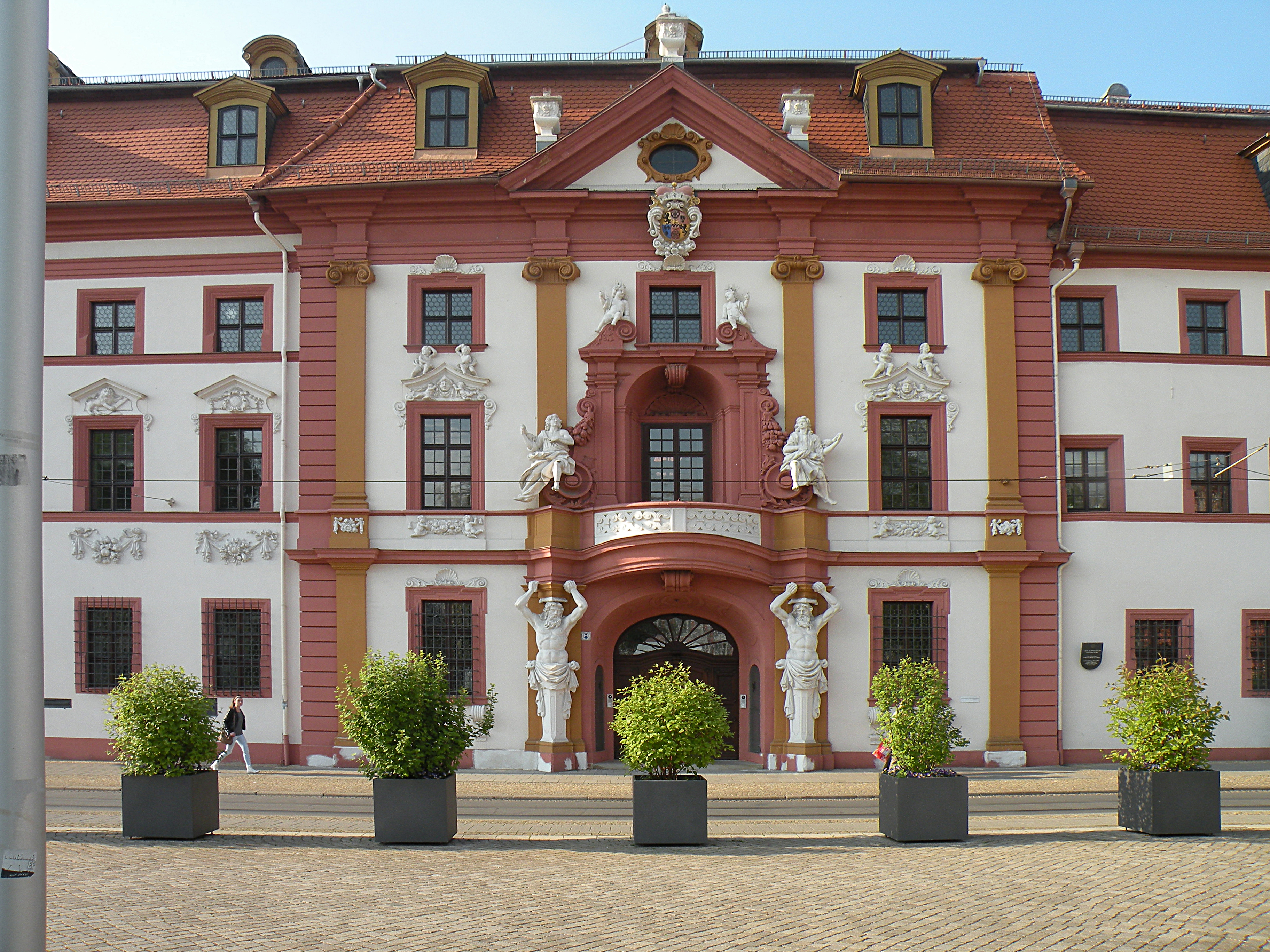 Барочное здание на Ангере